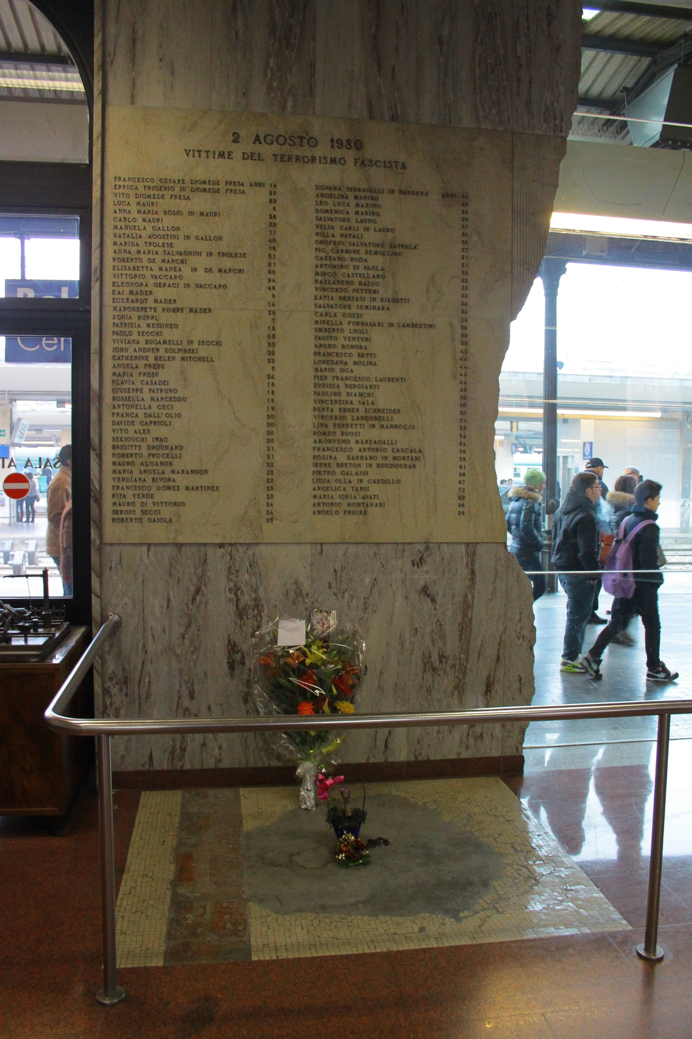 Lapide in memoria della strage di Bologna del 2 agosto 1980